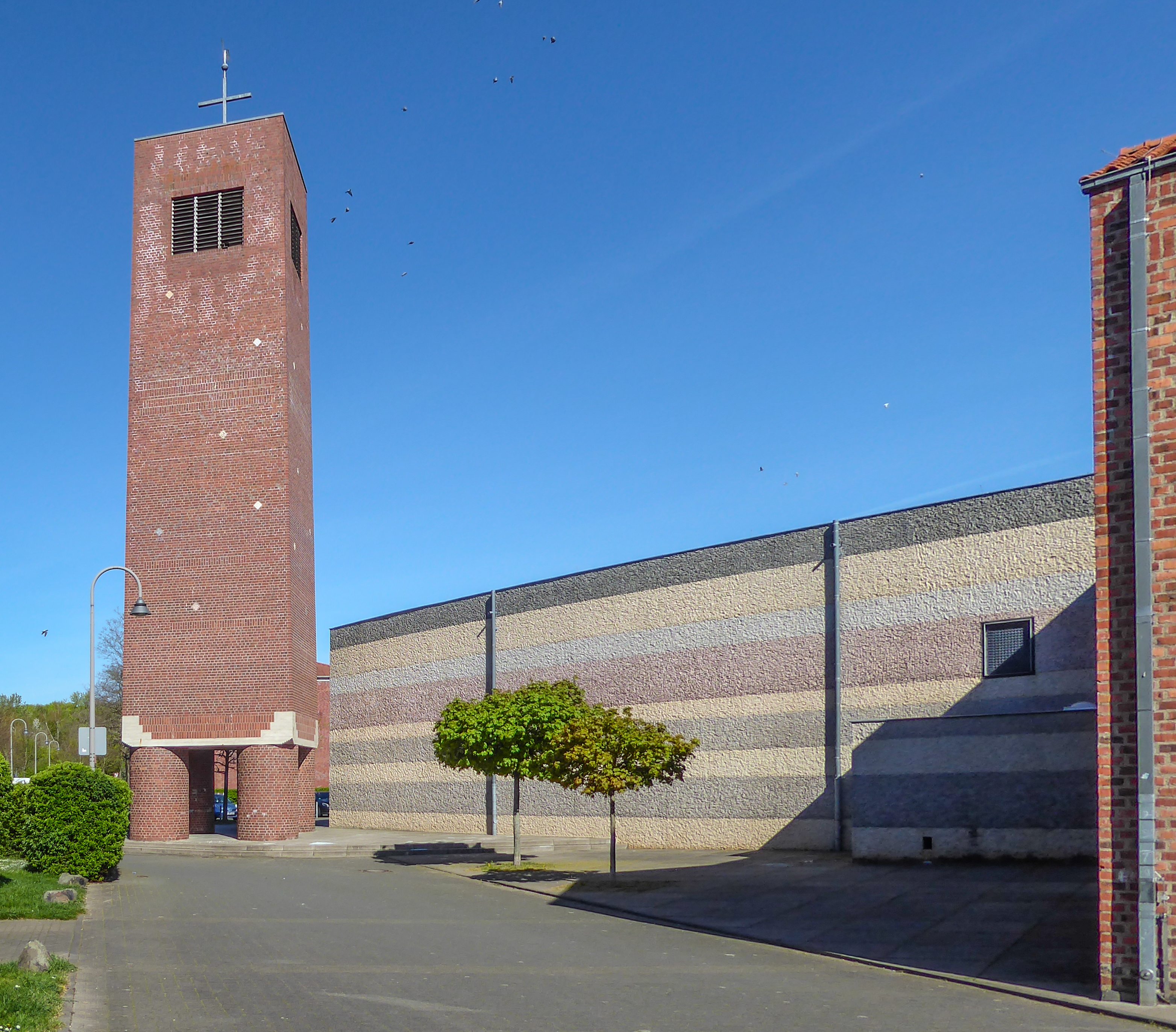 Gemeindezentrum St. Katharina von Siena (Köln-Blumenberg)